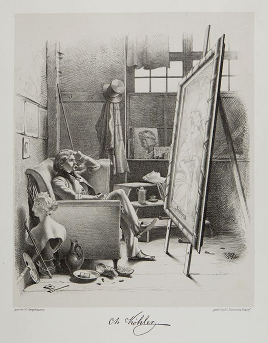 Lithografie Christian Köhler in seinem Atelier vor seinem Bild "Frühling", signiert mit Ch. Köhler. Illustration von Wilhelm Camphausen, 1845, Veröffentlichung Schattenseiten der Düsseldorfer Maler, nebst verkürzten Ansichten ihrer letzten Leistungen, in der 19 Einzelporträts Düsseldorfer Maler in ihren Ateliers gezeigt werden.